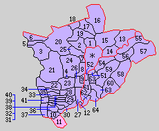 後の熊本県飽託郡域の町村制時点の町村。